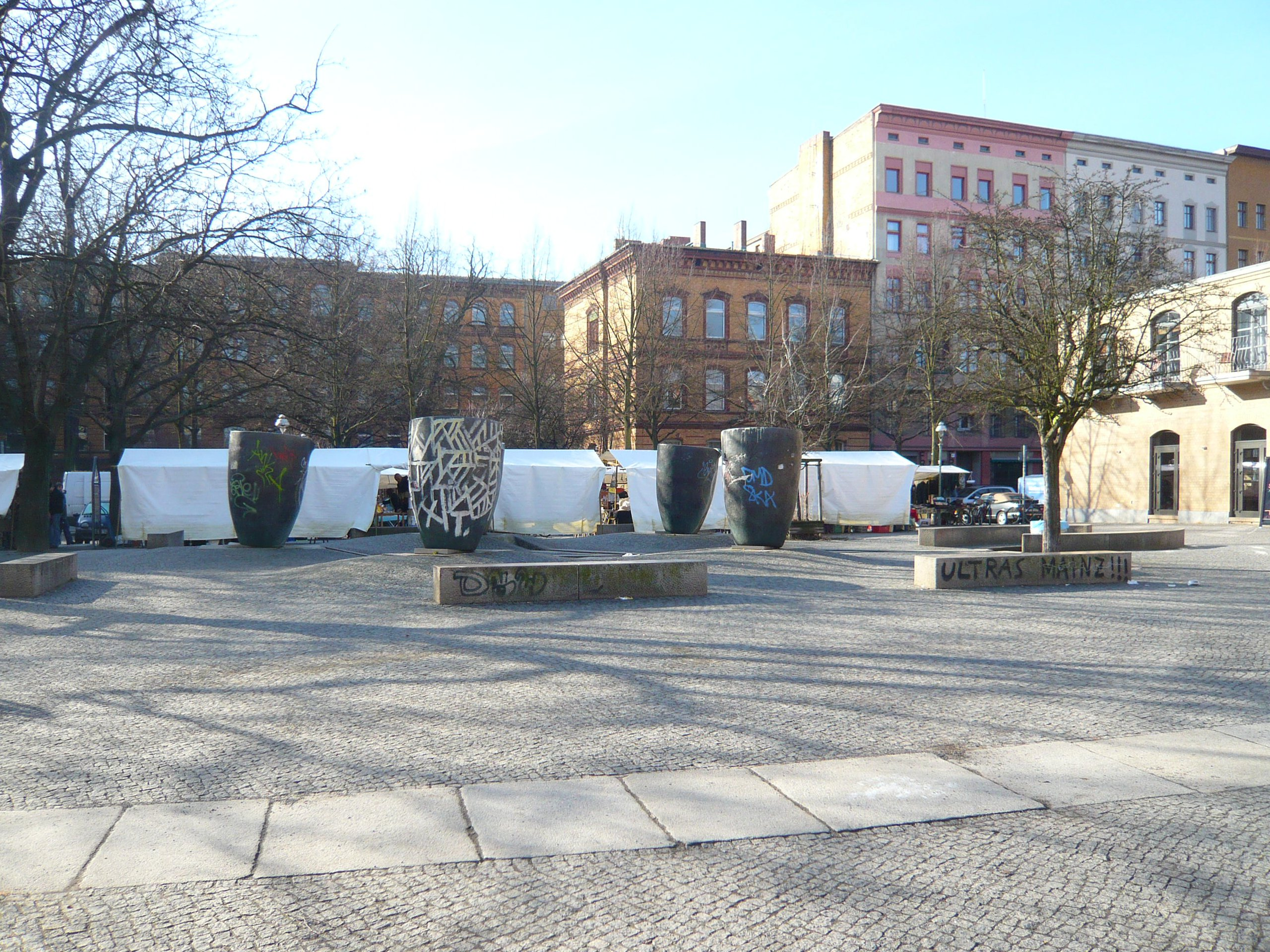 Berlin-Kreuzberg, Marheinekeplatz, Vor der Markthalle, Fünf-Tiegel-Brunnen. Dahinter das Baudenkmal der Doppelschule, Bergmannstraße 28/29